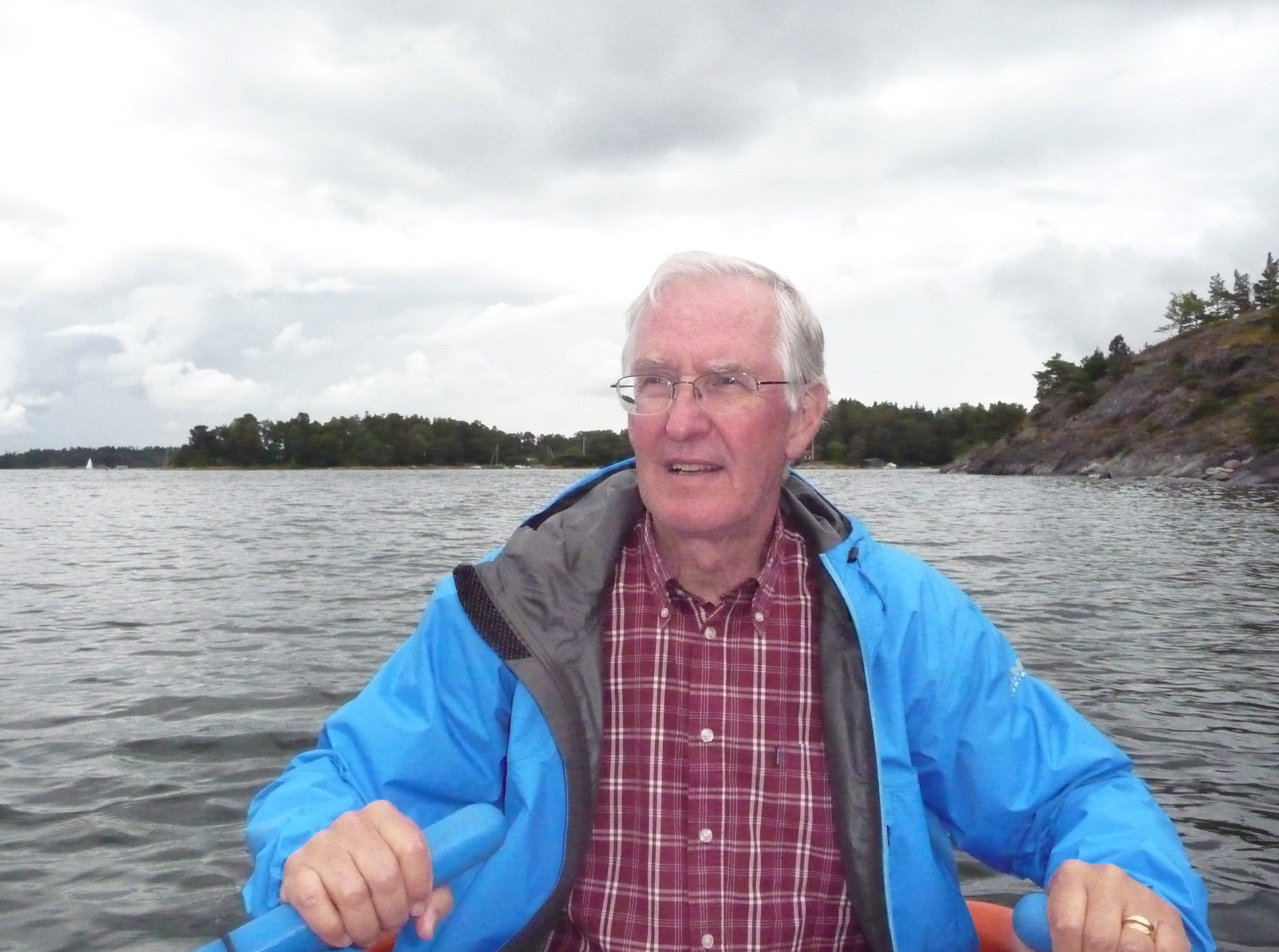 Botanikern och lavforskaren Roland Moberg, vid Runmarö i Stockholms skärgård sommaren 2009.